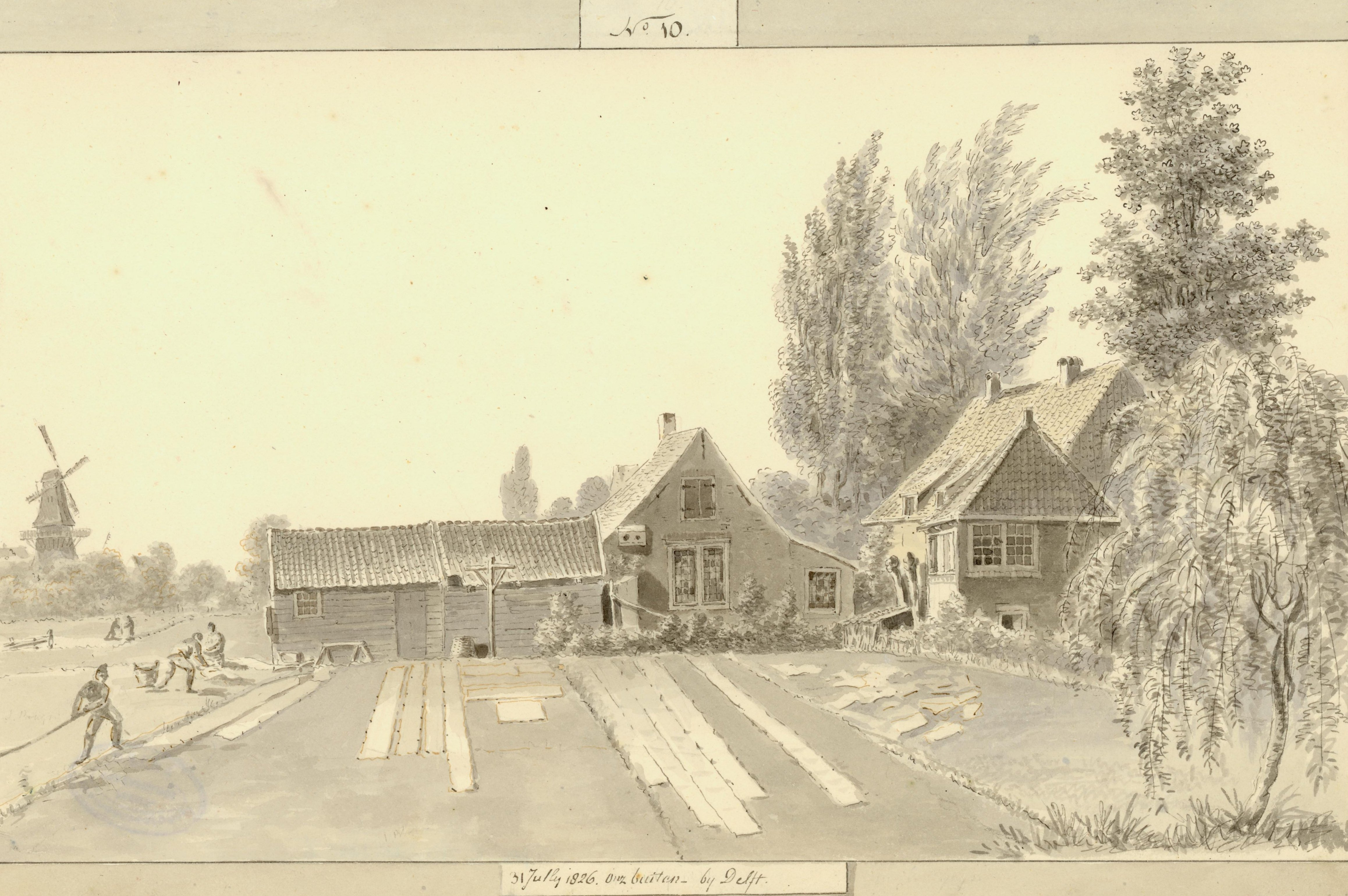 Een woning met bleekvelden in de omgeving van Delft, waarschijnlijk ten westen van de stad. Links op de achtergrond een molen, wellicht een van de molens op de stadswallen. Laken ligt op de bleekvelden in de zomerzon. Pen en penseel in grijs, pen in bruin.